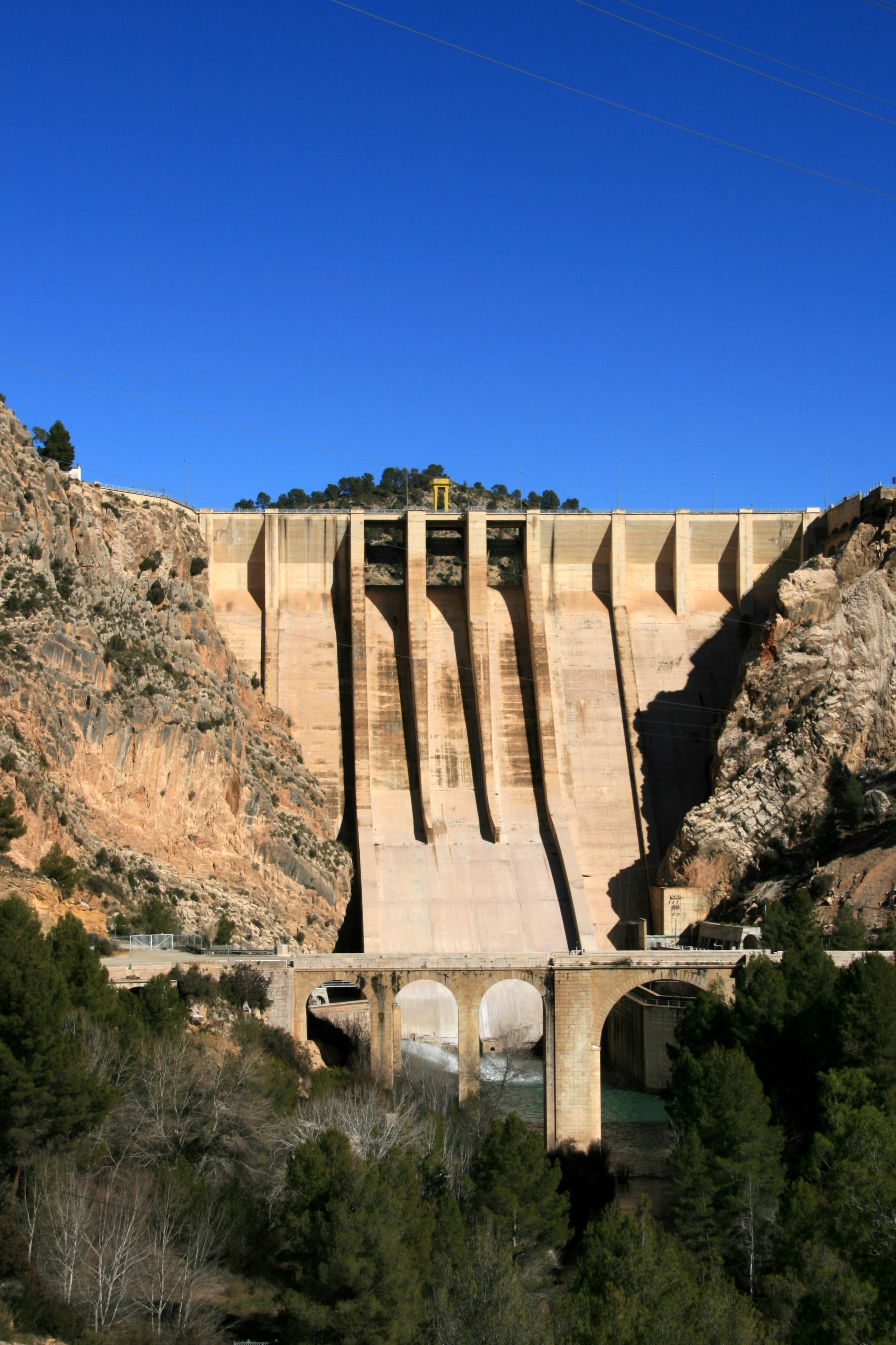 Presa de Contreras